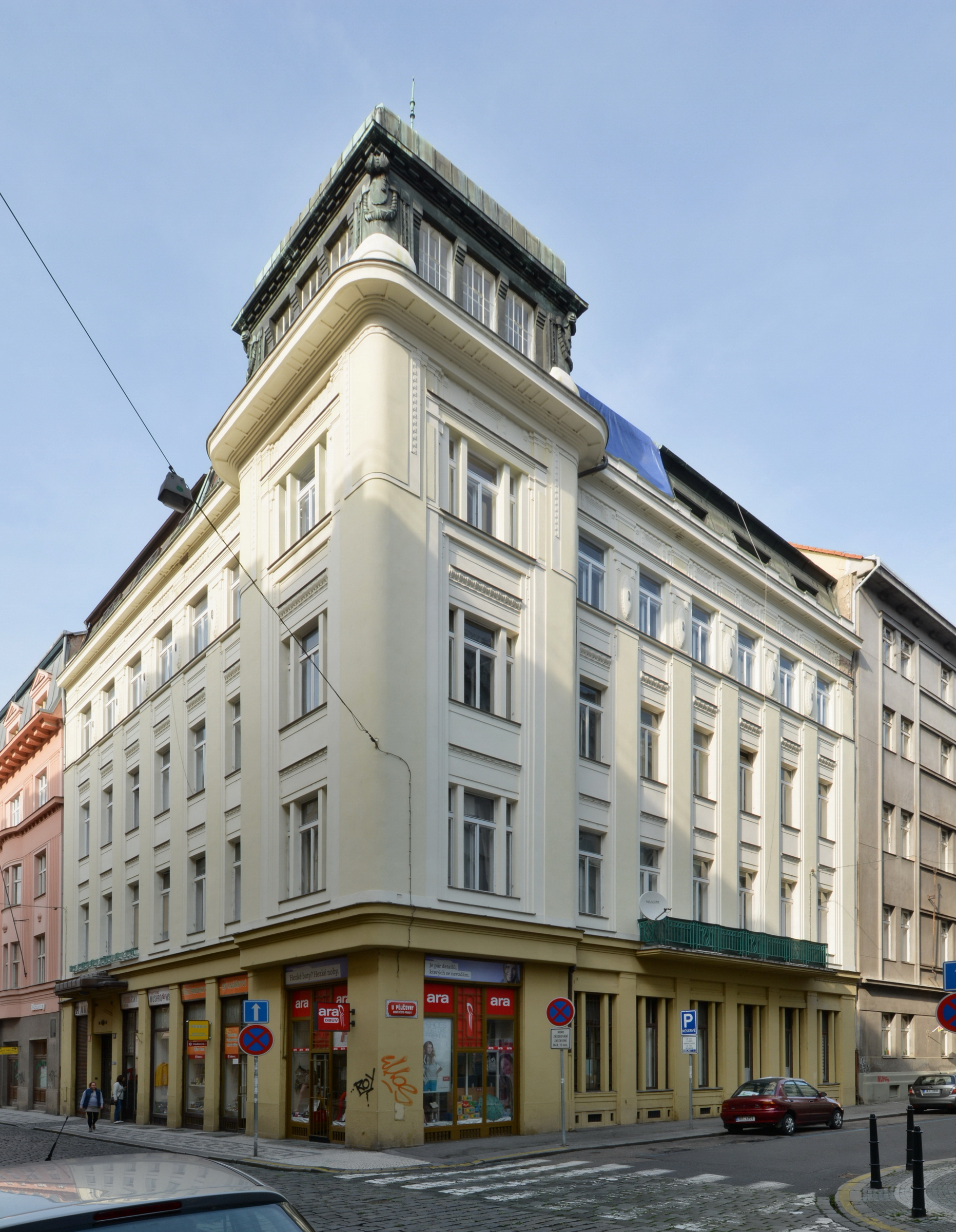 Friedrich Kick, obytný dům čp. 970, Praha 1-Nové Město, Růžová 7, nároží ulic Růžová a U Půjčovny.